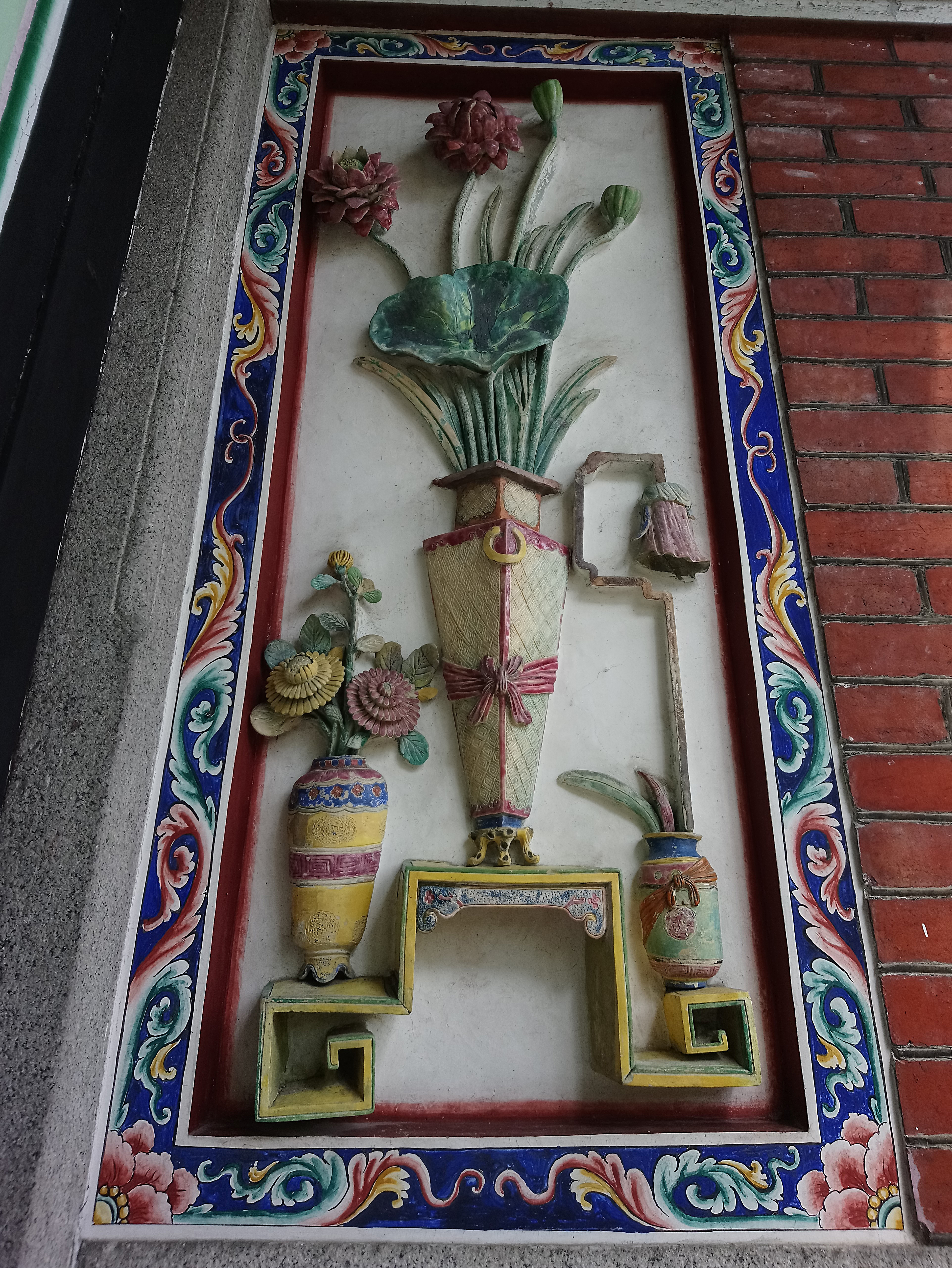 臺北孔子廟儀門交趾陶蓮花,臺北市大同區大龍次分區保安里